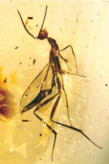 Leptofoenus pittfieldae (male)